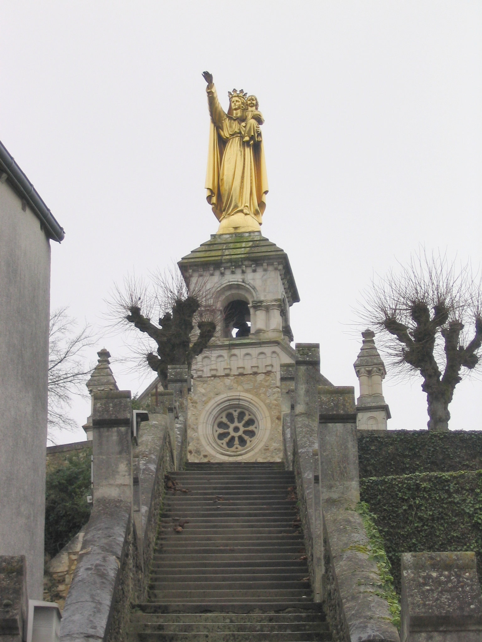 Statue de la Bonne-Dame - Chapelle de la Bonne-Dame, Argenton-sur-Creuse (Indre)